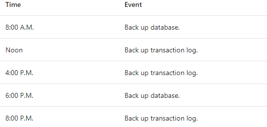 Монгол: Жишээ